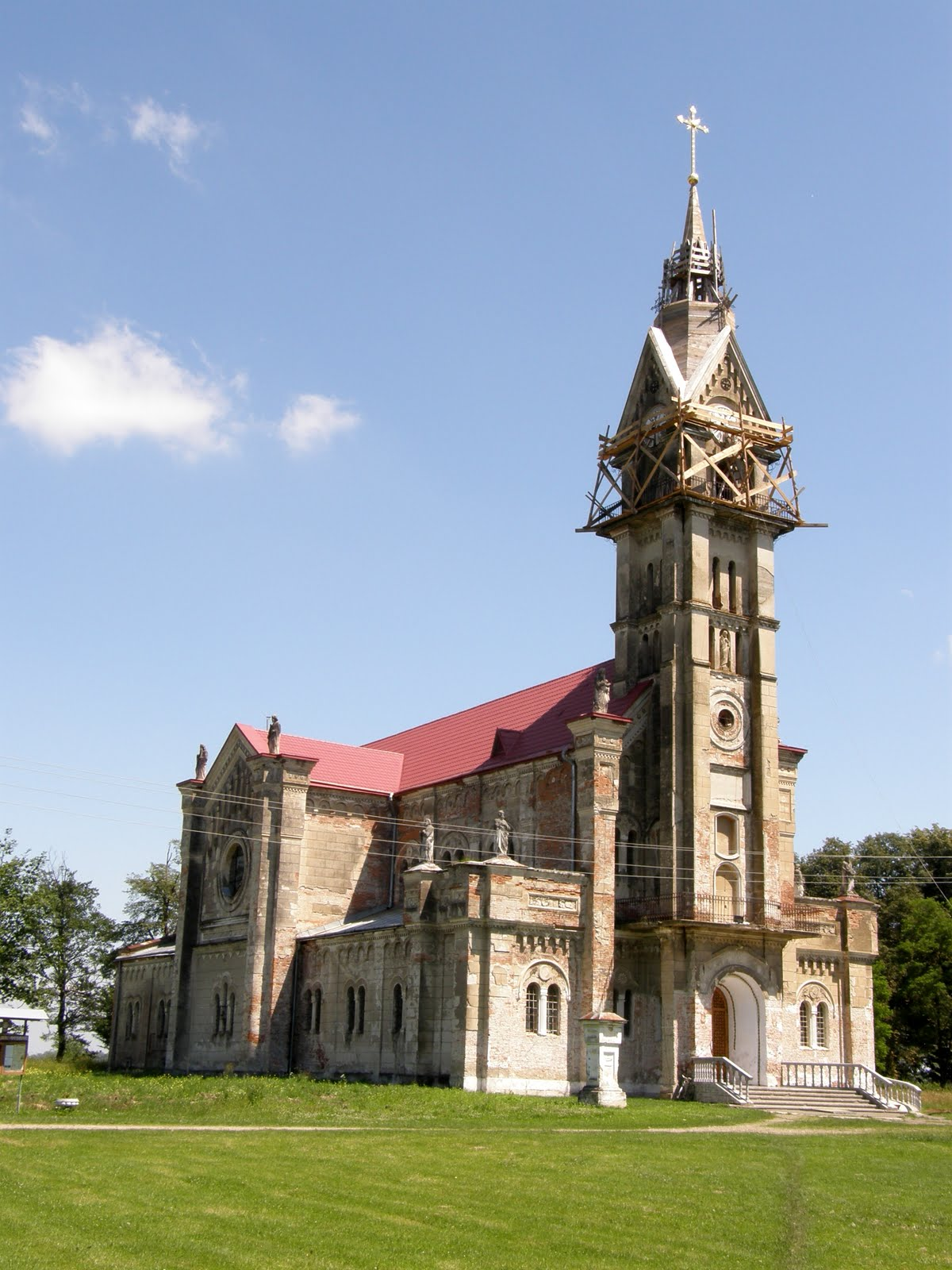 Гніздичів (Кохавина). Монастир Св. Герарда. Hnizdyczów (Kohavyna). Klasztor św Gerard Гнездичев (Кохавина). Монастырь Св. Герарда